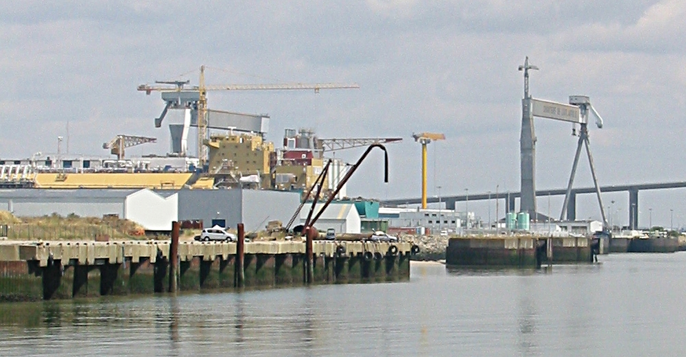 Installations des Chantiers de l'Atlantique (aujourd'hui AyerYards France) à Saint-Nazaire.